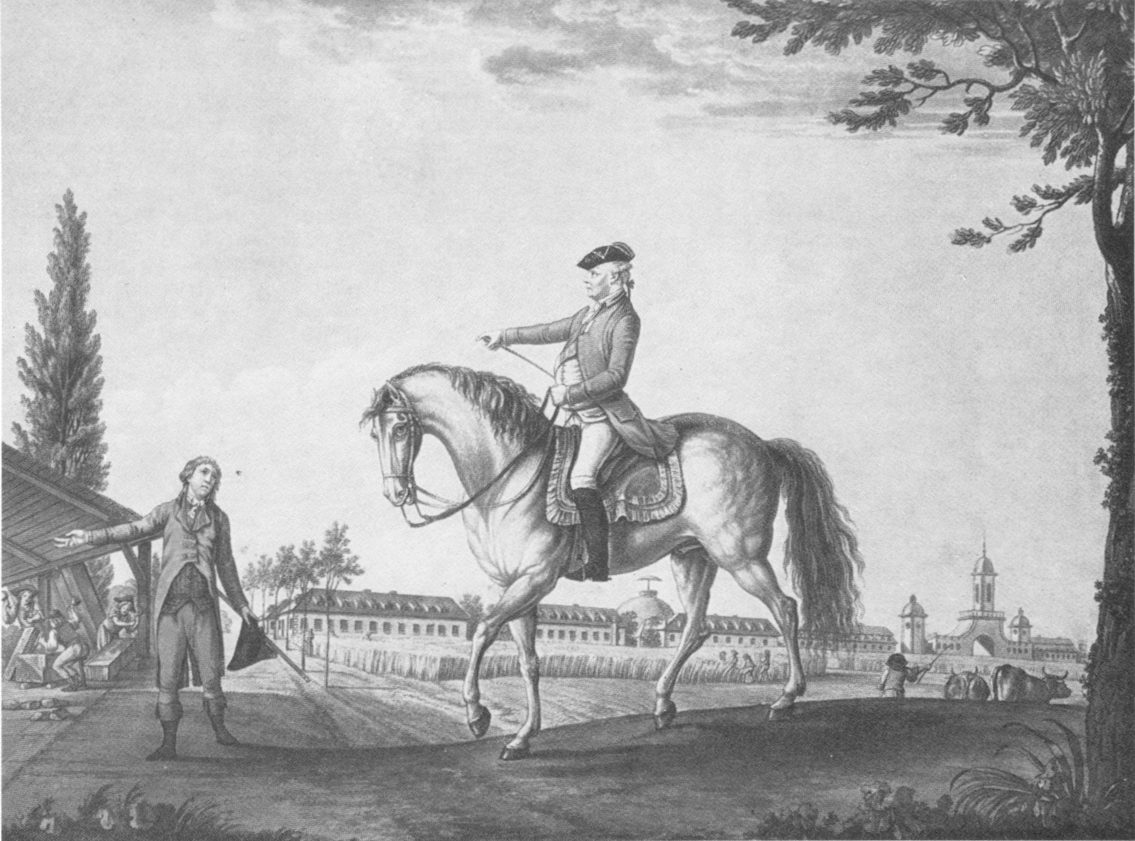 Viktor Heideloff: Herzog Karl Eugen beim Bau von Schloss Hohenheim, 1785. Auf einem nach einer Zeichnung von Viktor Heideloff gefertigten Stich ist Herzog Karl festgehalten, wie er hoch zu Roß, das Schloß im Hintergrund, seinem Baumeister Fischer Anweisungen erteilt, der auf die Arbeit in der Bauhütte weist. (Max Schefold: Der englische Garten in Hohenheim. In: Schwaben : Monatshefte für Volkstum und Kultur, Band 11, 1939, Seite 512-513).